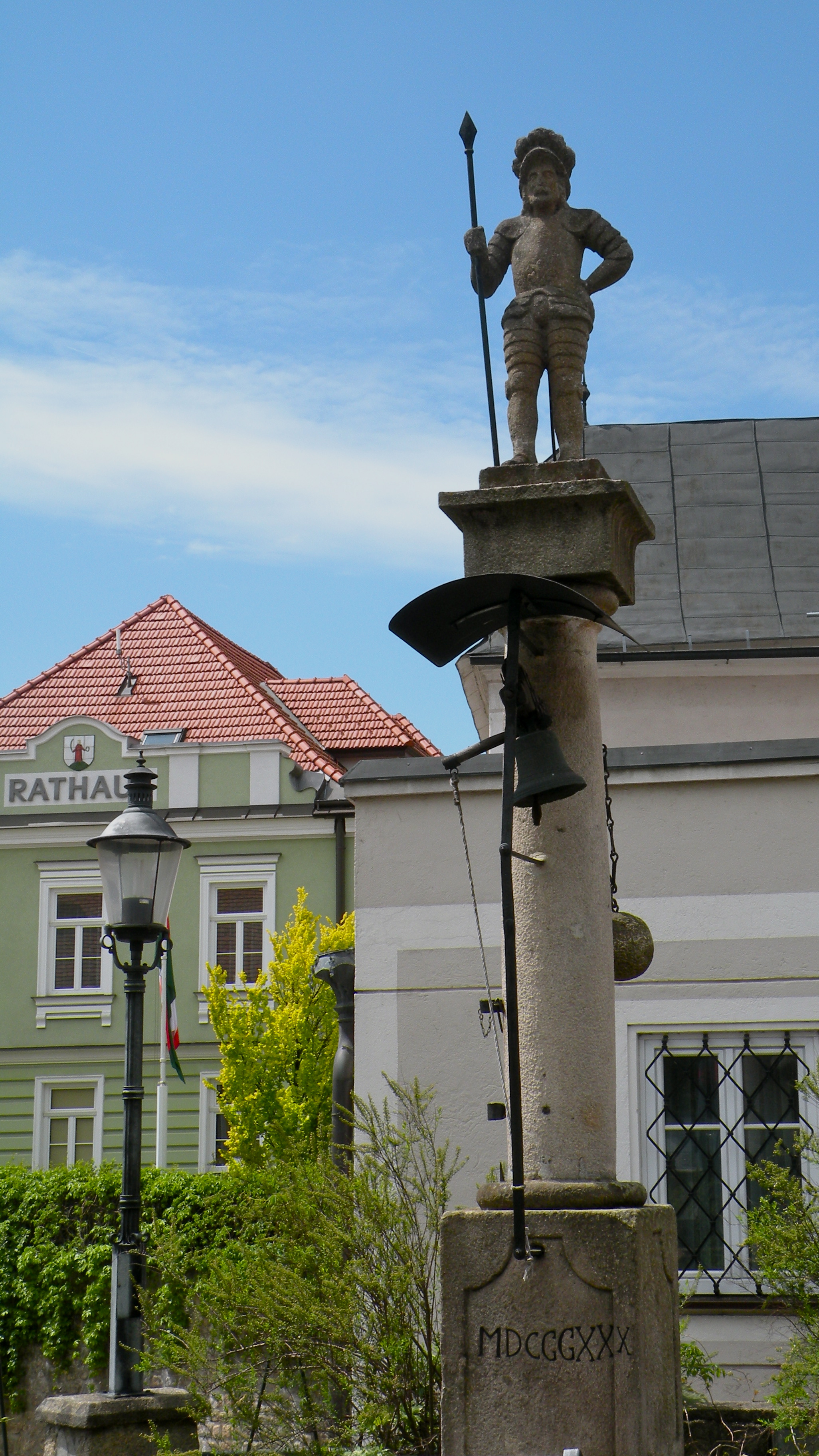 Pranger Heidenreichstein